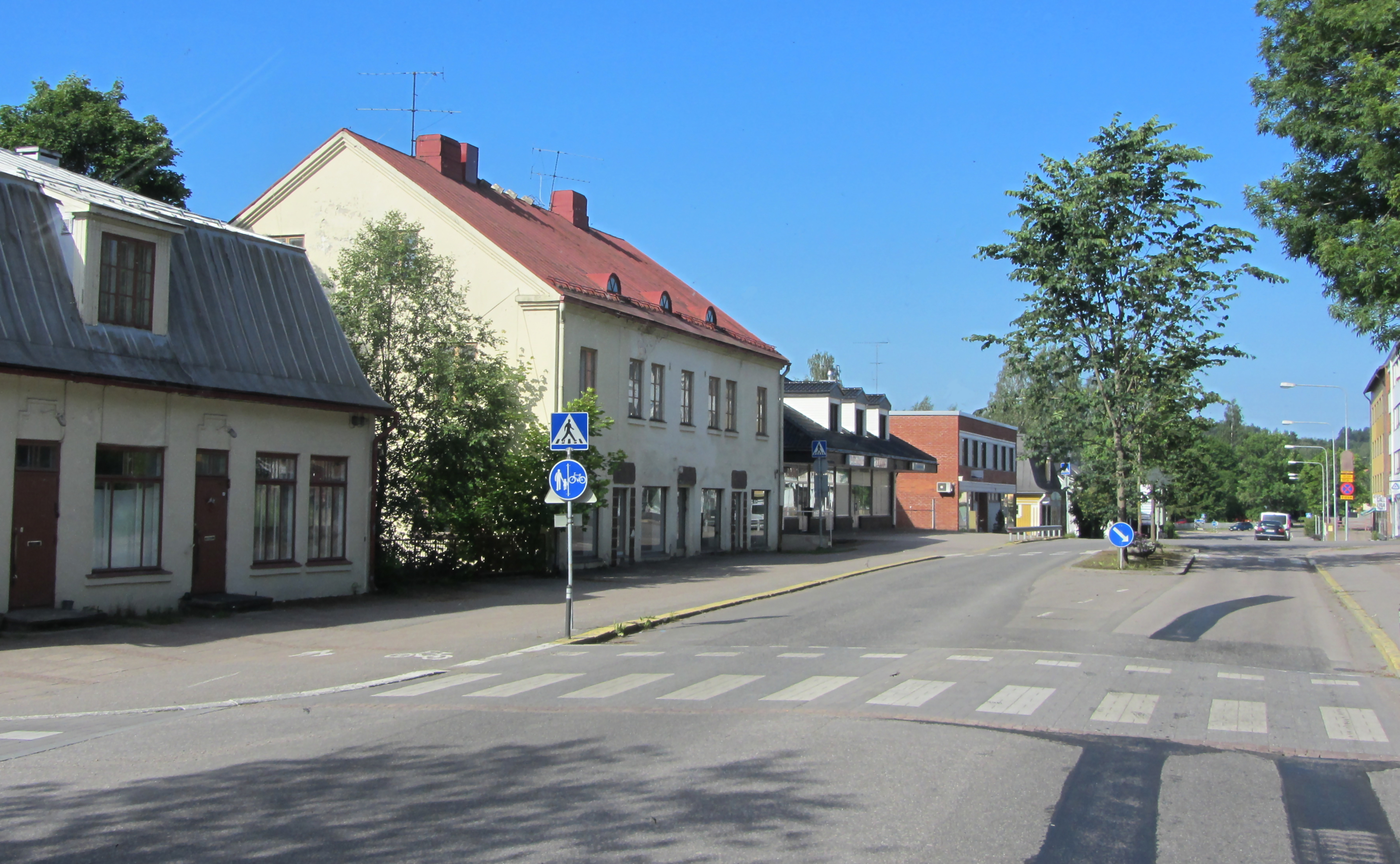 Karkkila - Helsingintie